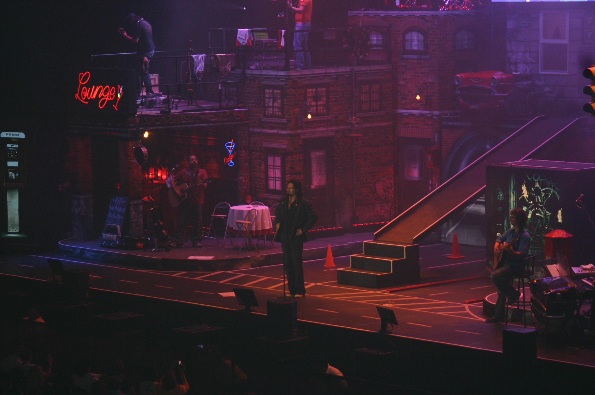 Ricardo Arjona in Laredo Entertainment Center